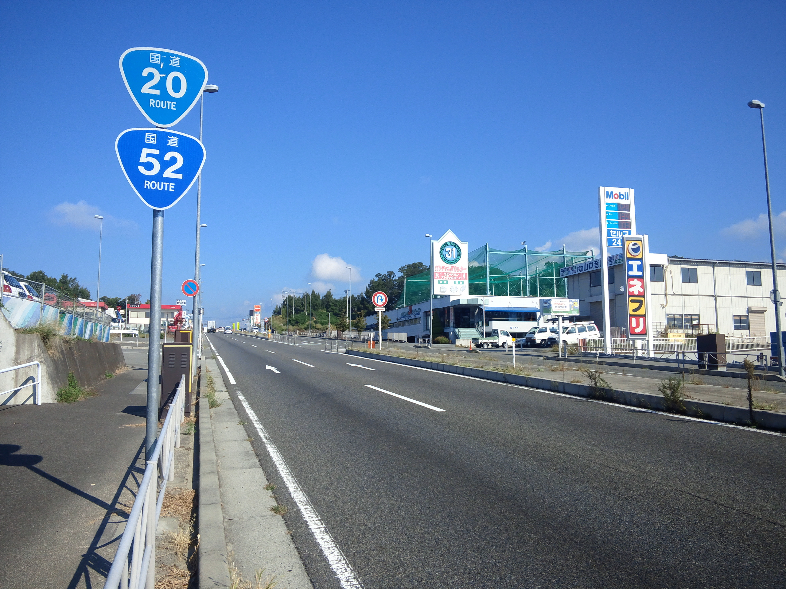 国道20号線山梨県甲斐市竜王字片瀬付近（韮崎市方面を撮影）